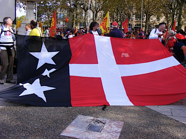 Foto van vlag van de Arpitaanse Beweging (2008).Arpetan: N'émâge de drapél du Mouvament Harpeitanya (2008).